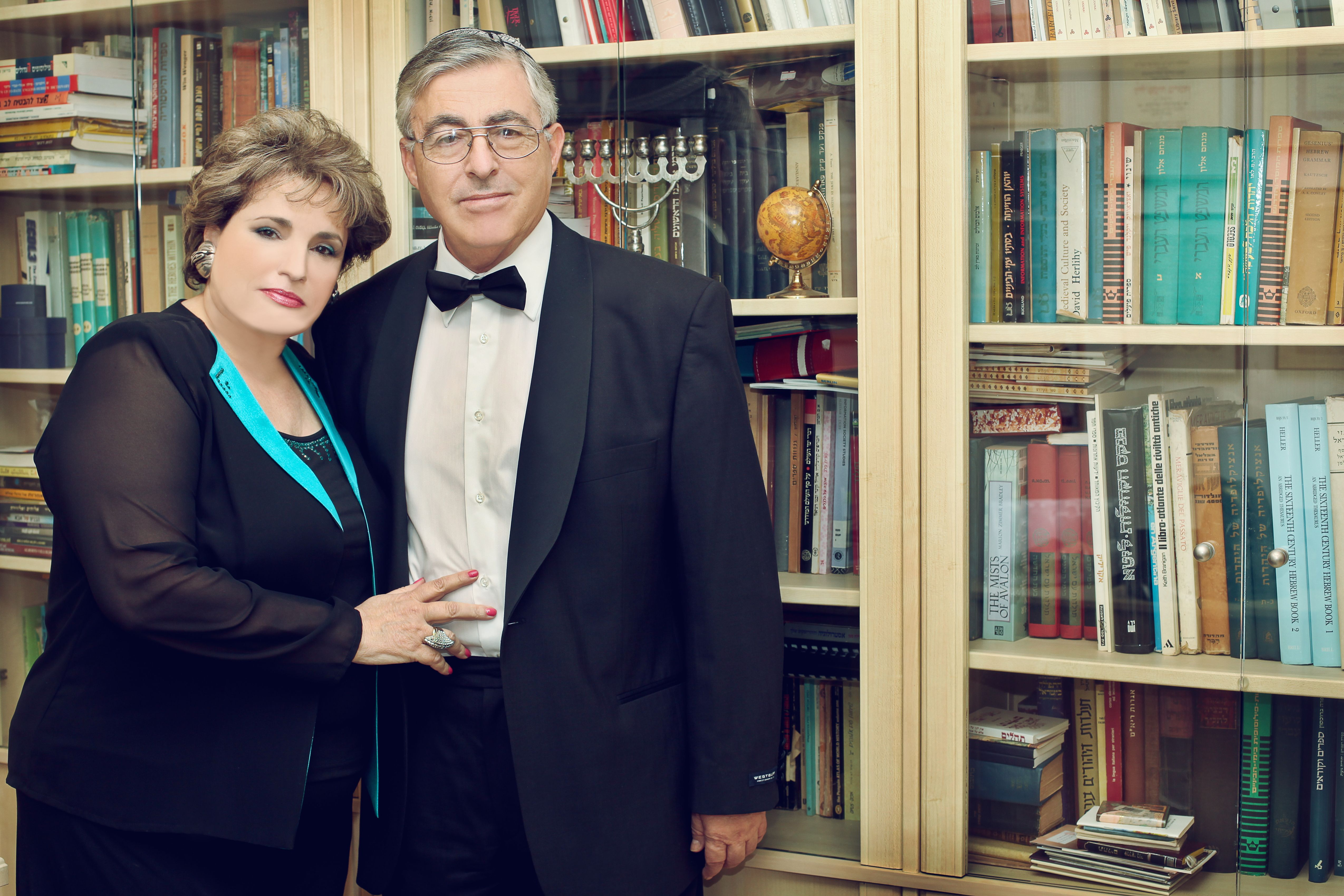 שפרה ברוכסון-ארביב וחיים אריק ארביב